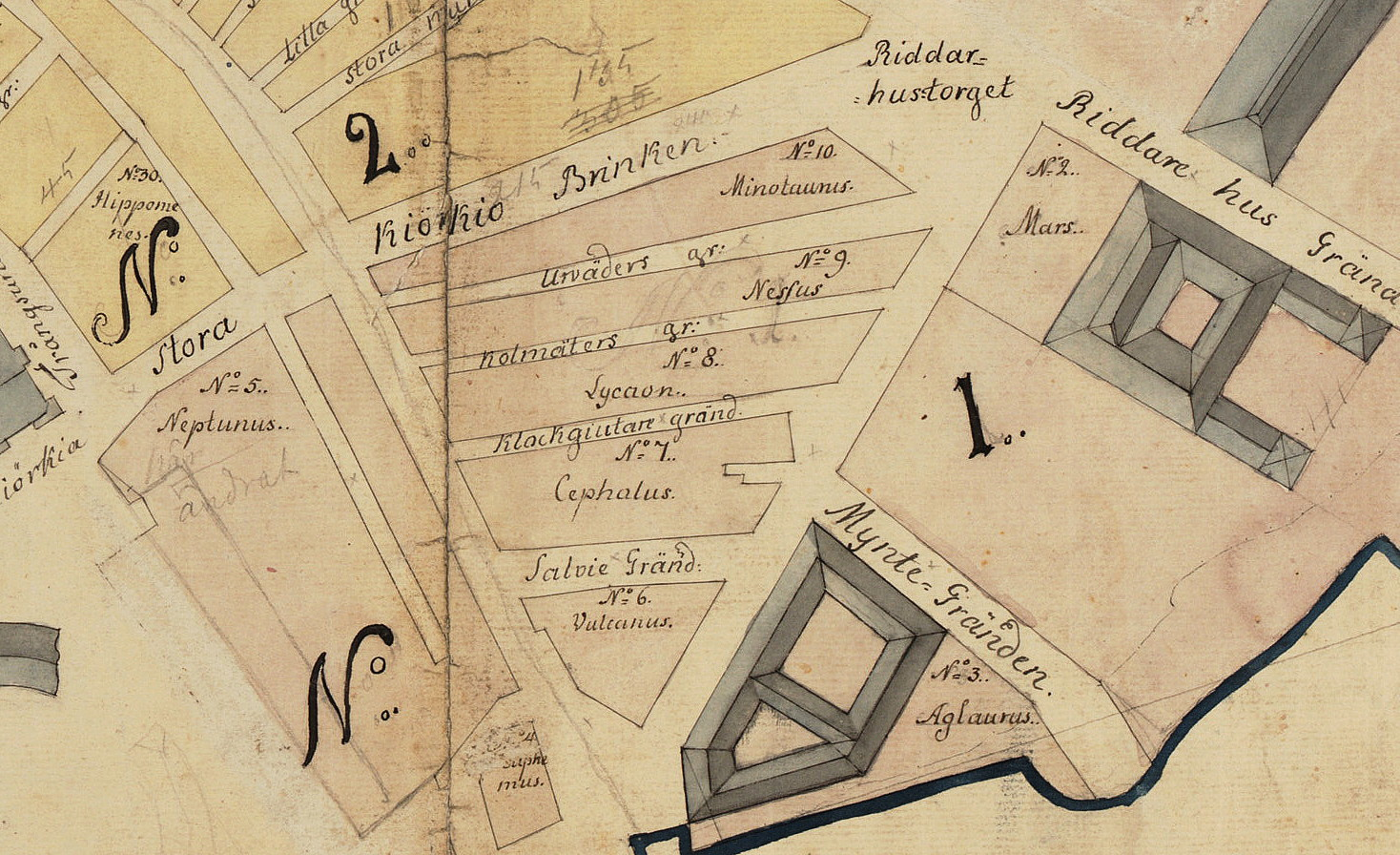 Del av plan av Stockholms stad mellan norr- och söderström 1733 visande kvarteren Minotaurus, Lychaon, Nessus, Cephalus (norr är nertill)